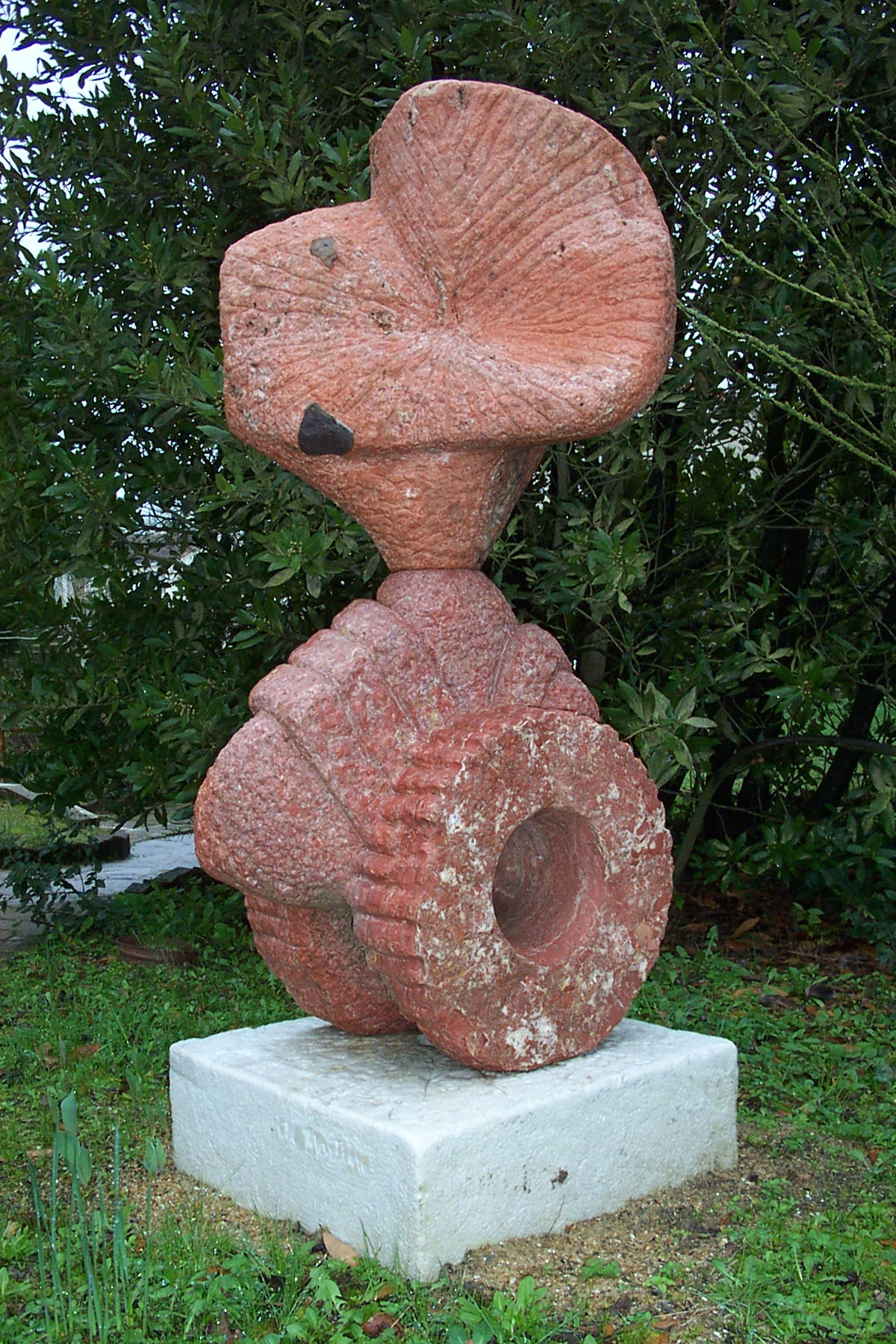 Sculpture sur travertin - Photo prise à Clisson (France - 2002)